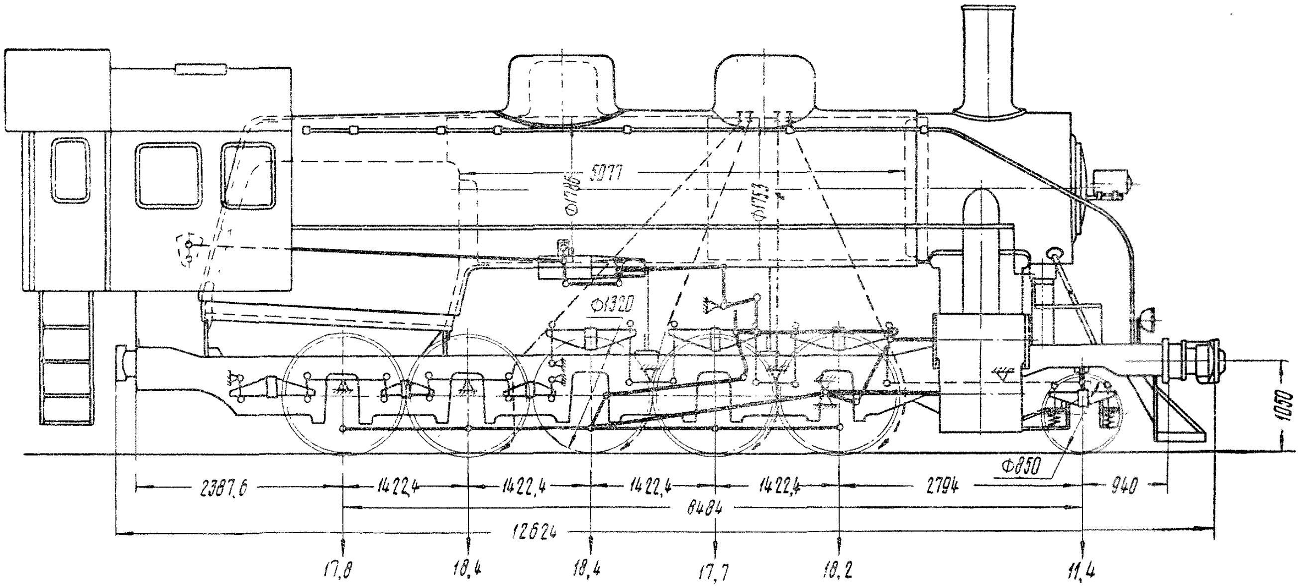 Основные размеры паровоза Ем